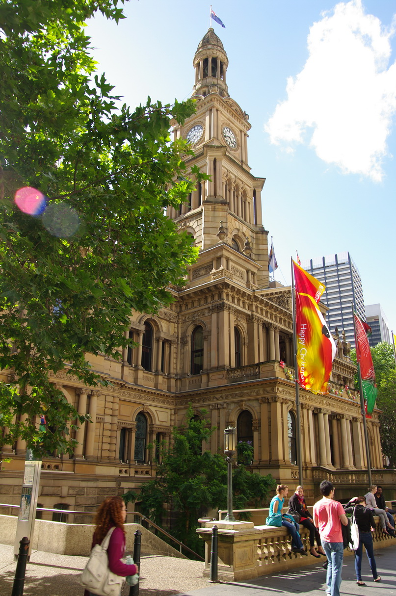 Townhall, Sydney, Australien